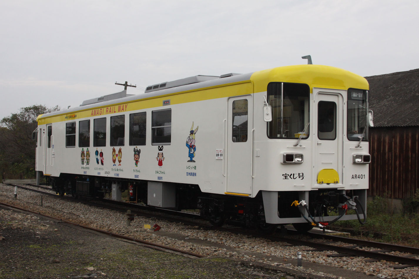 甘木鉄道AR401（2代目塗装）